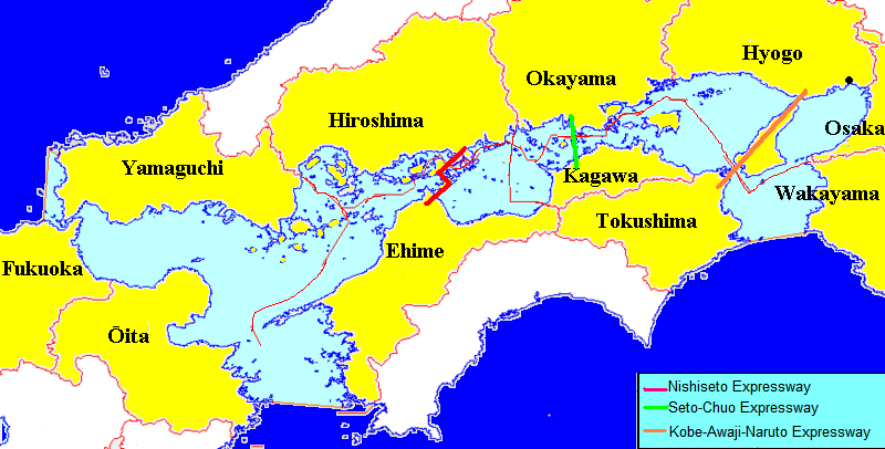 Kaart van de Japanse Binnenzee en de daaromliggende prefecturen